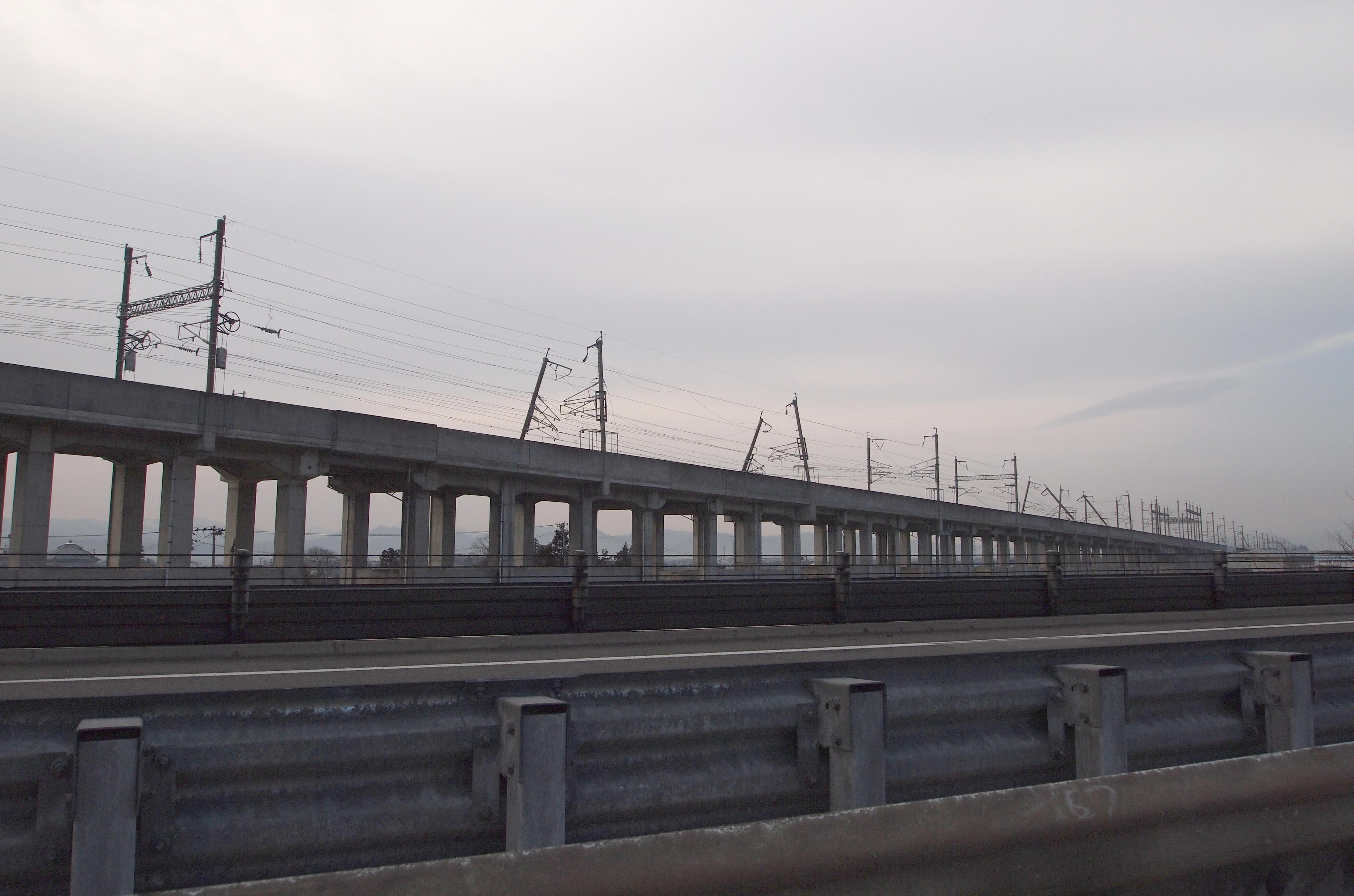 東日本大震災による、東北新幹線の架線の被害状況。国見付近撮影